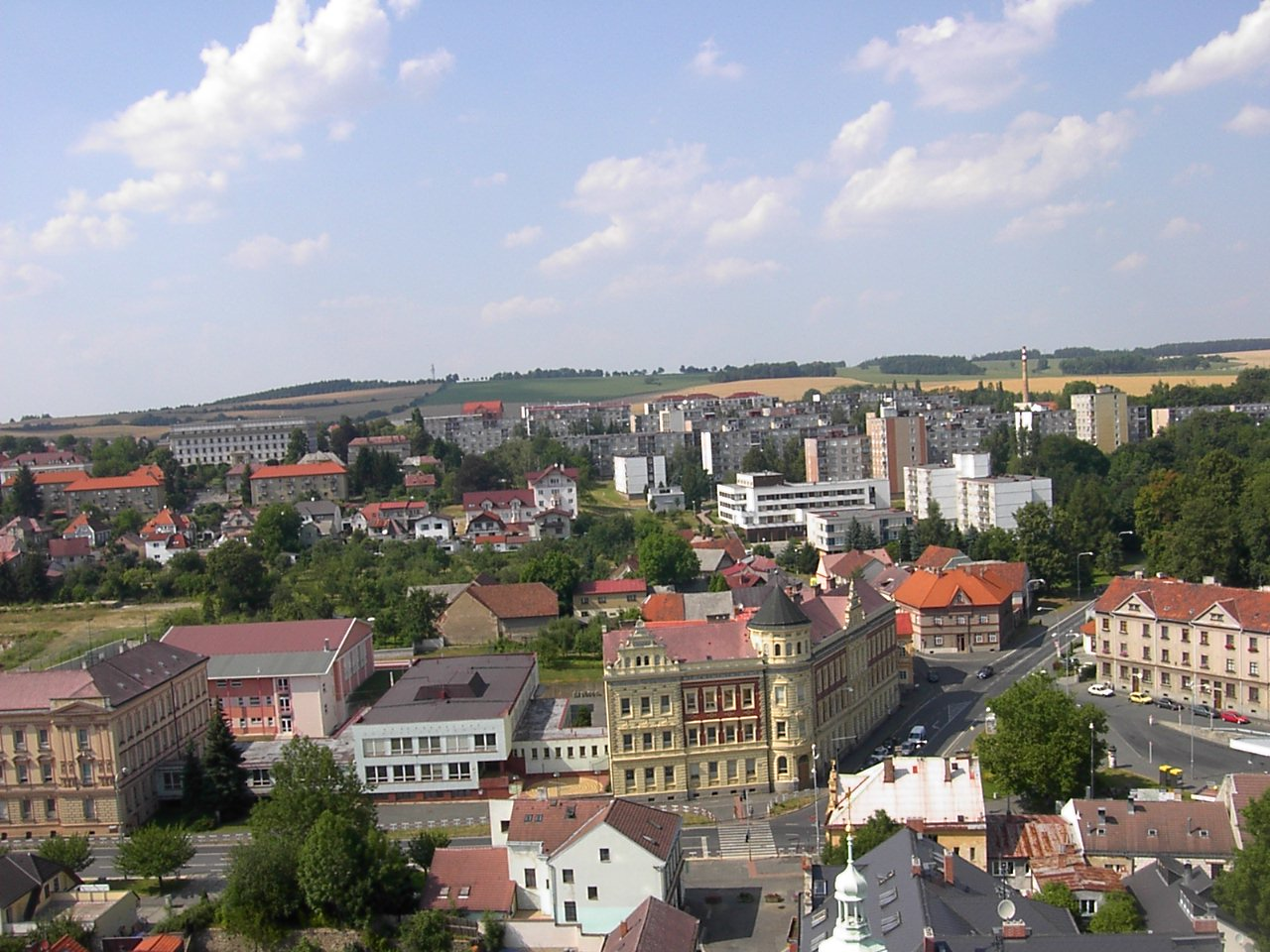 Česky: Pohled na Týnské předměstí v Domažlicích se ZŠ Komenského v popředí a vrchem Baldov na obzoru.